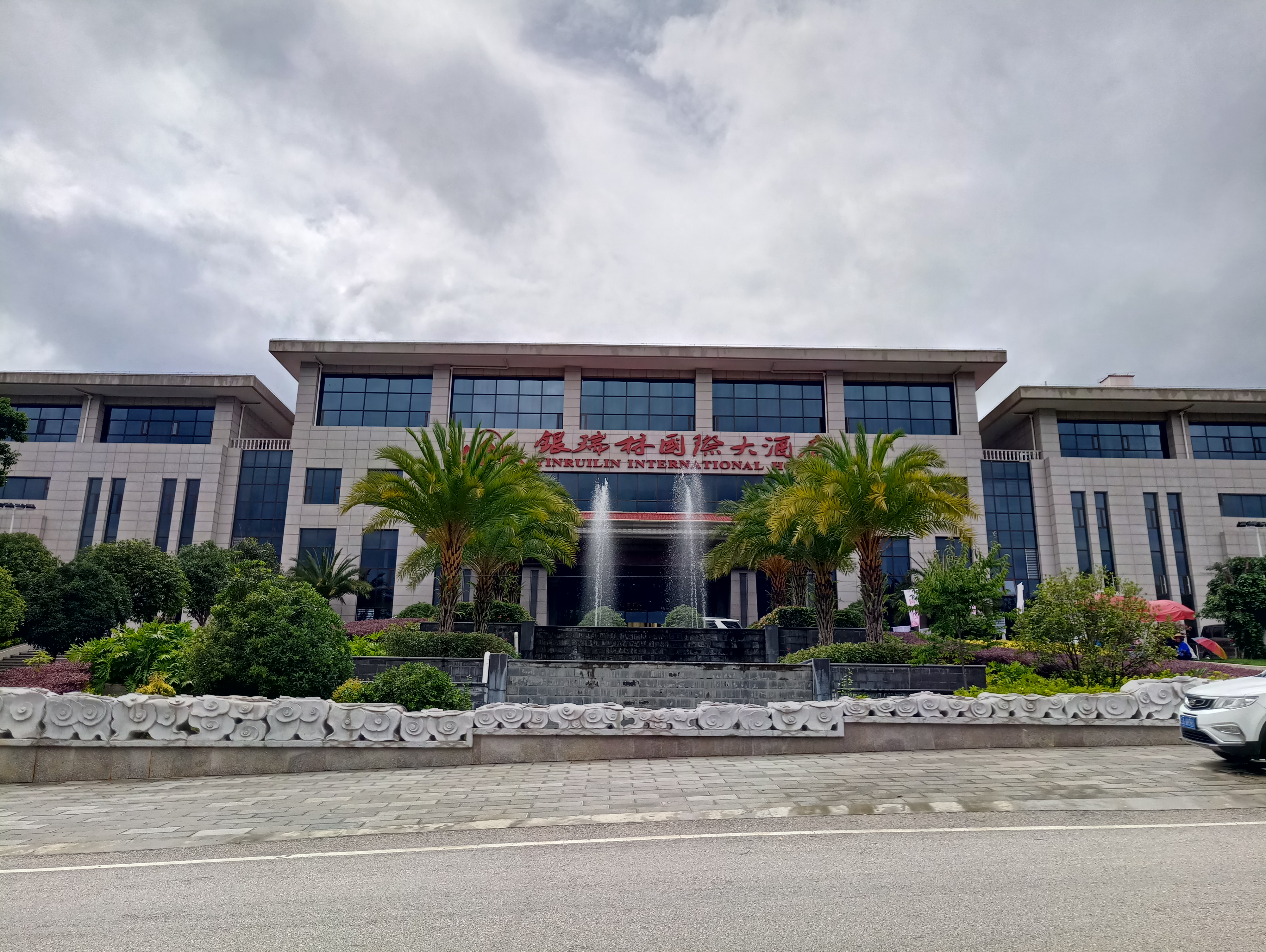 中文（中国大陆）: 石林银瑞林国际大酒店